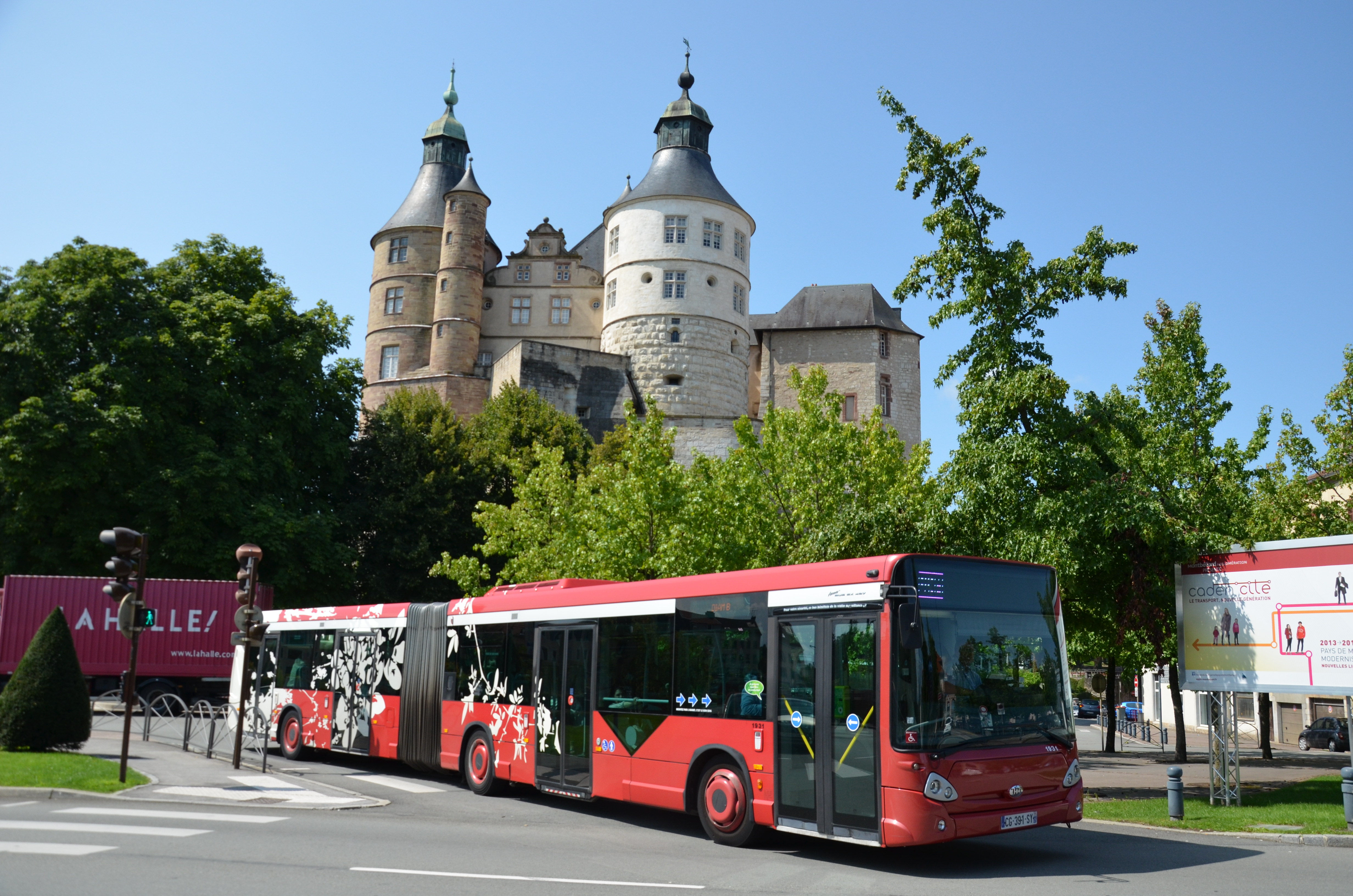 Heuliez GX 427 n°1931 sur la ligne DIAM B de Montbéliard, à l'Acropole.